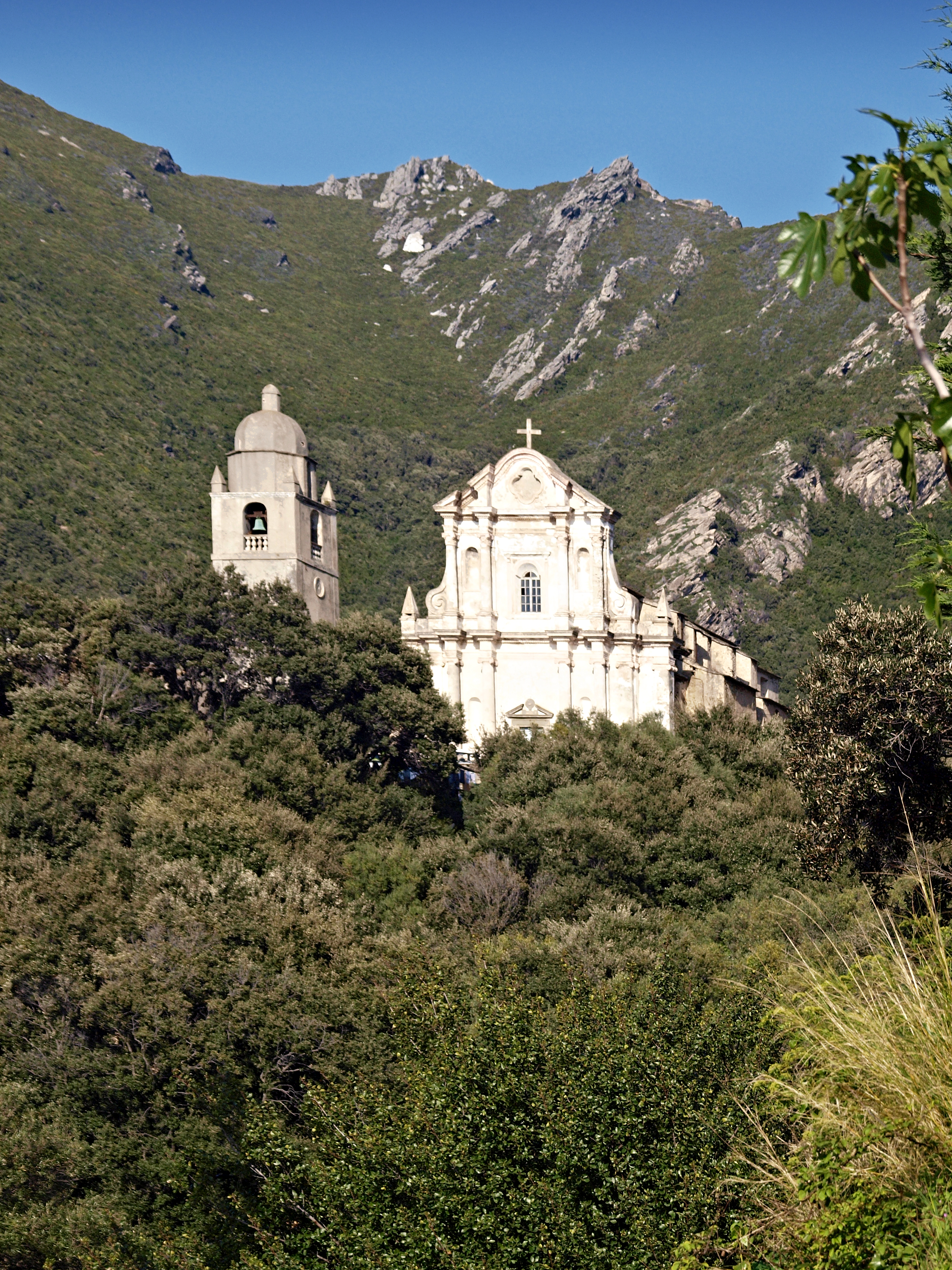 Morsiglia (Corsica) - Église San Cipriano